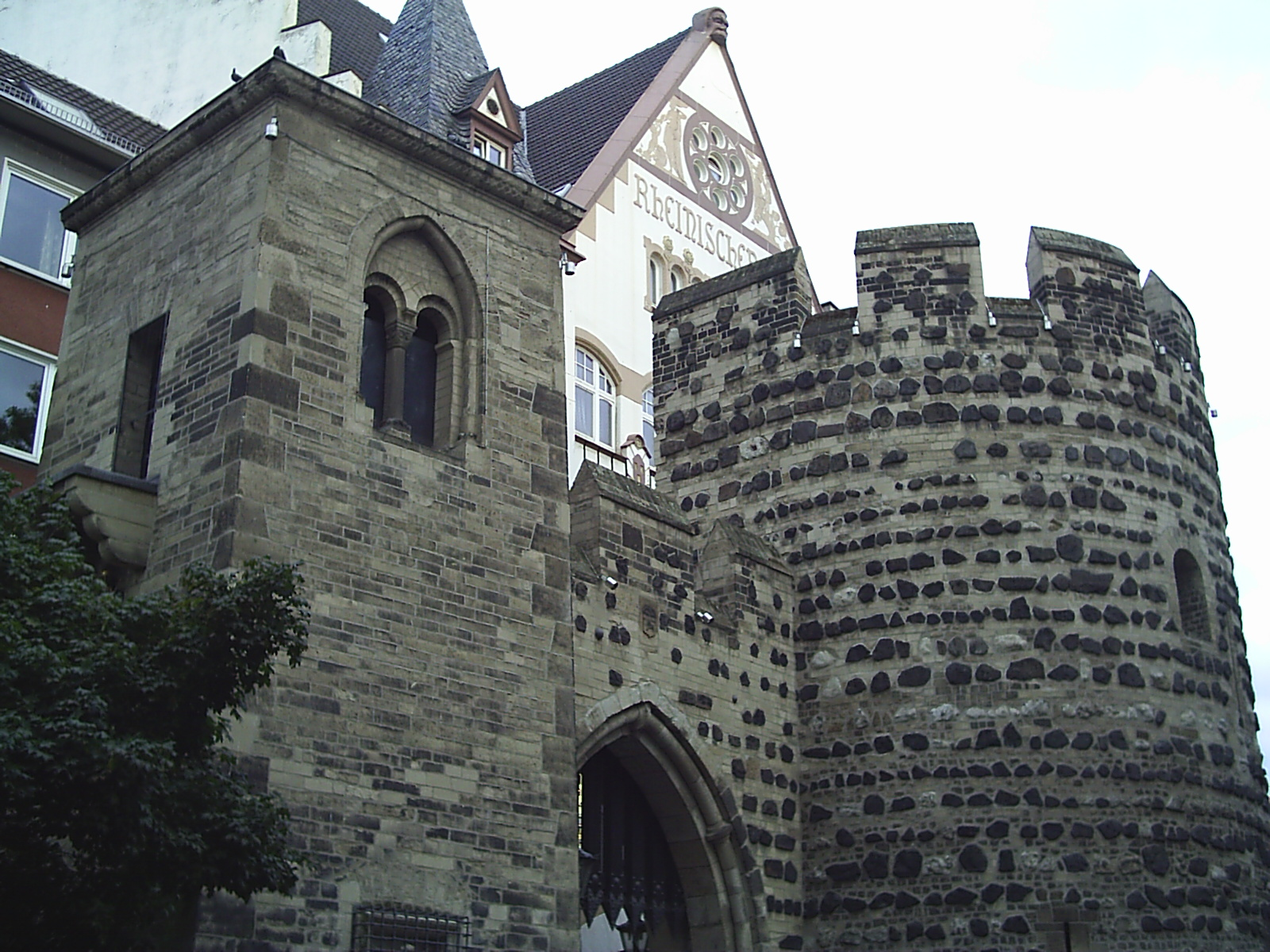 Sterntor, Bonn